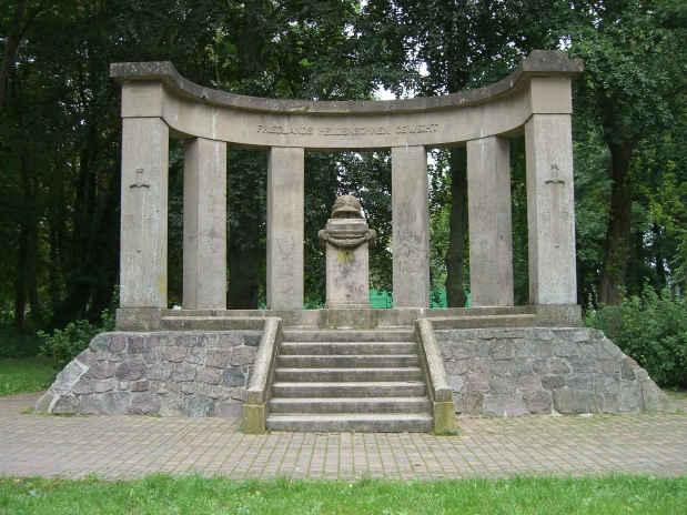 Denkmal 1914/18 Friedland/Meckl. sog. "Kriegerdenkmal"